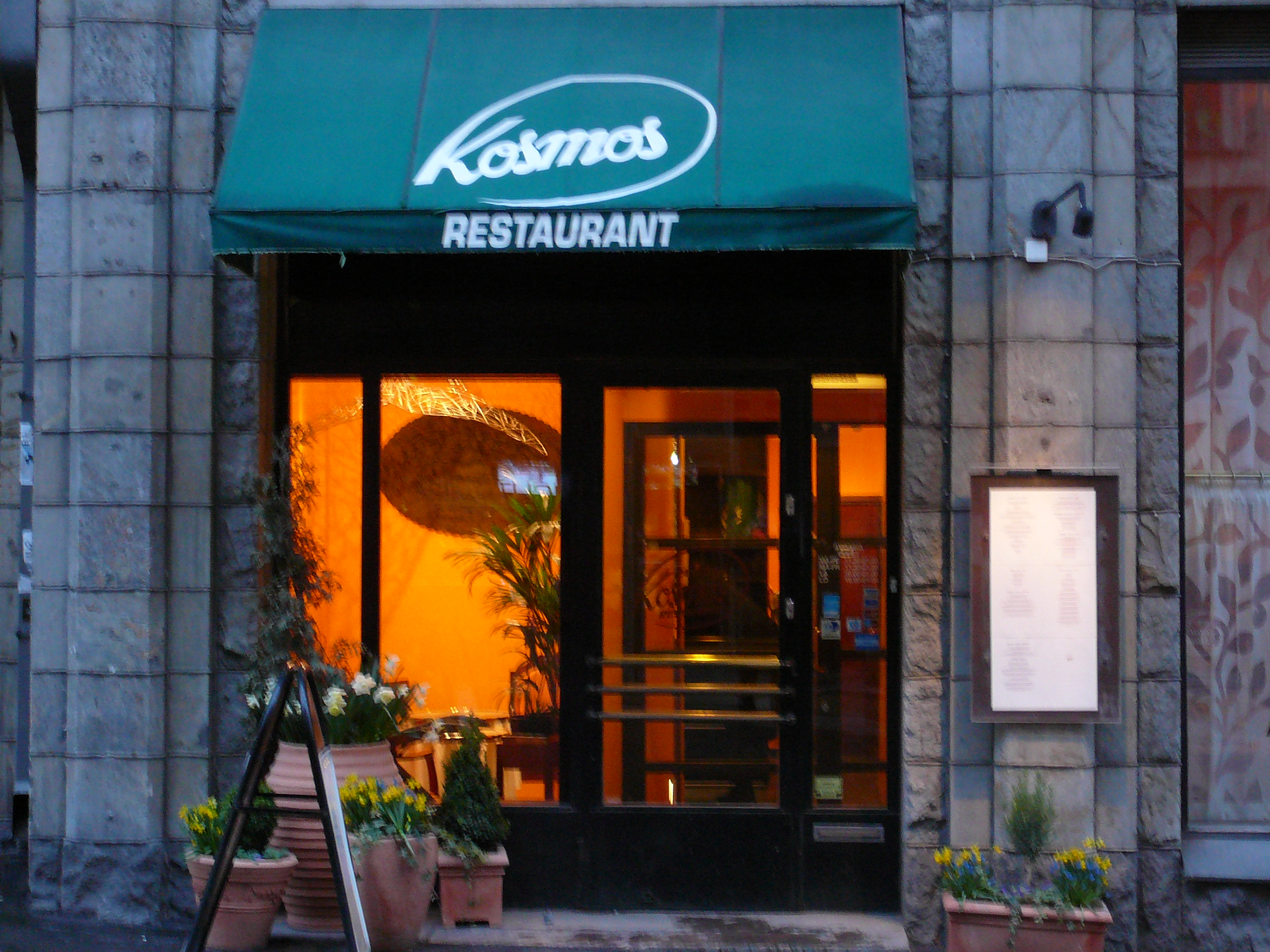 Restaurant Kosmos in Helsinki